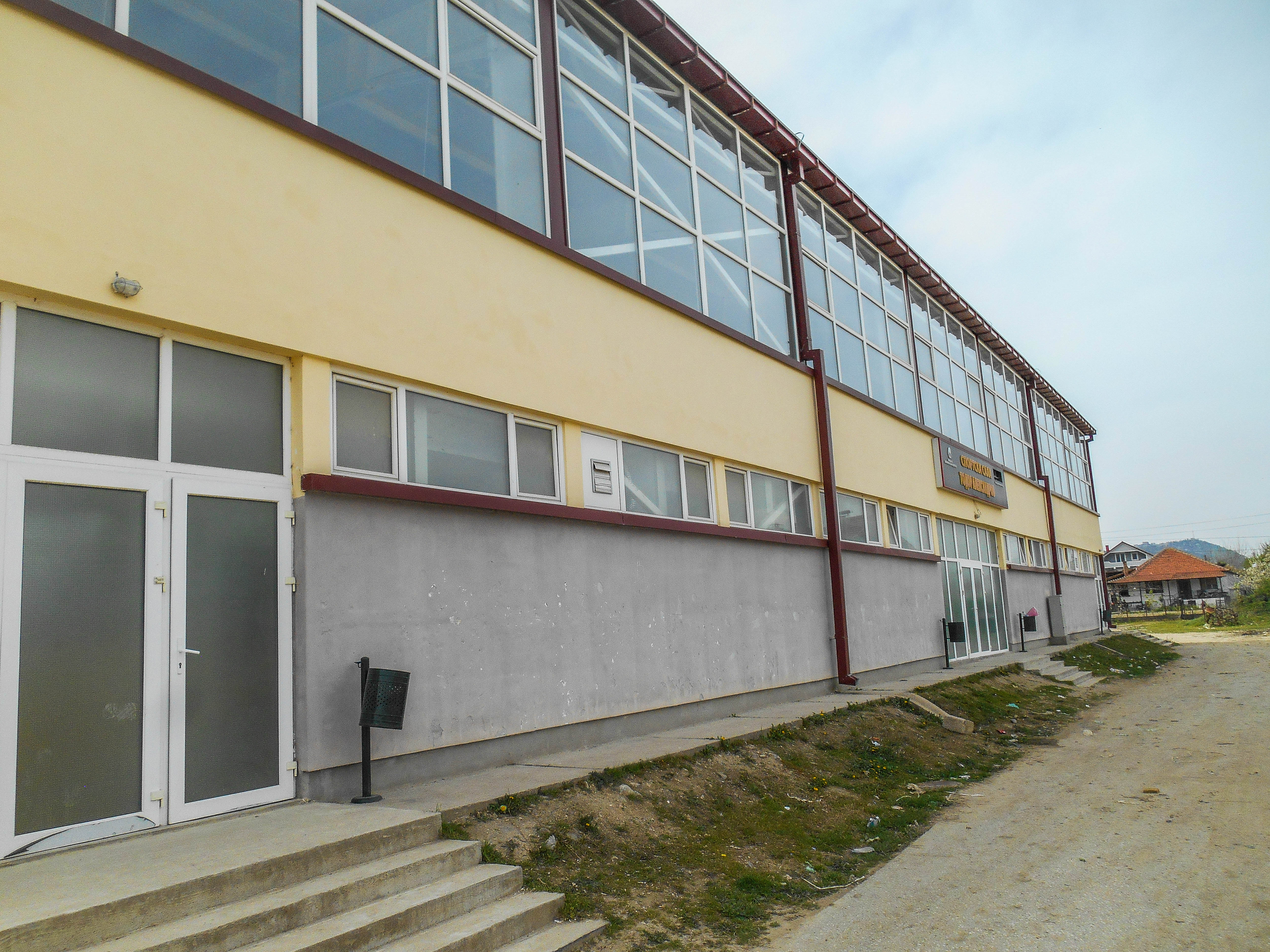 Спортска сала Тодор Александров - Куклиш